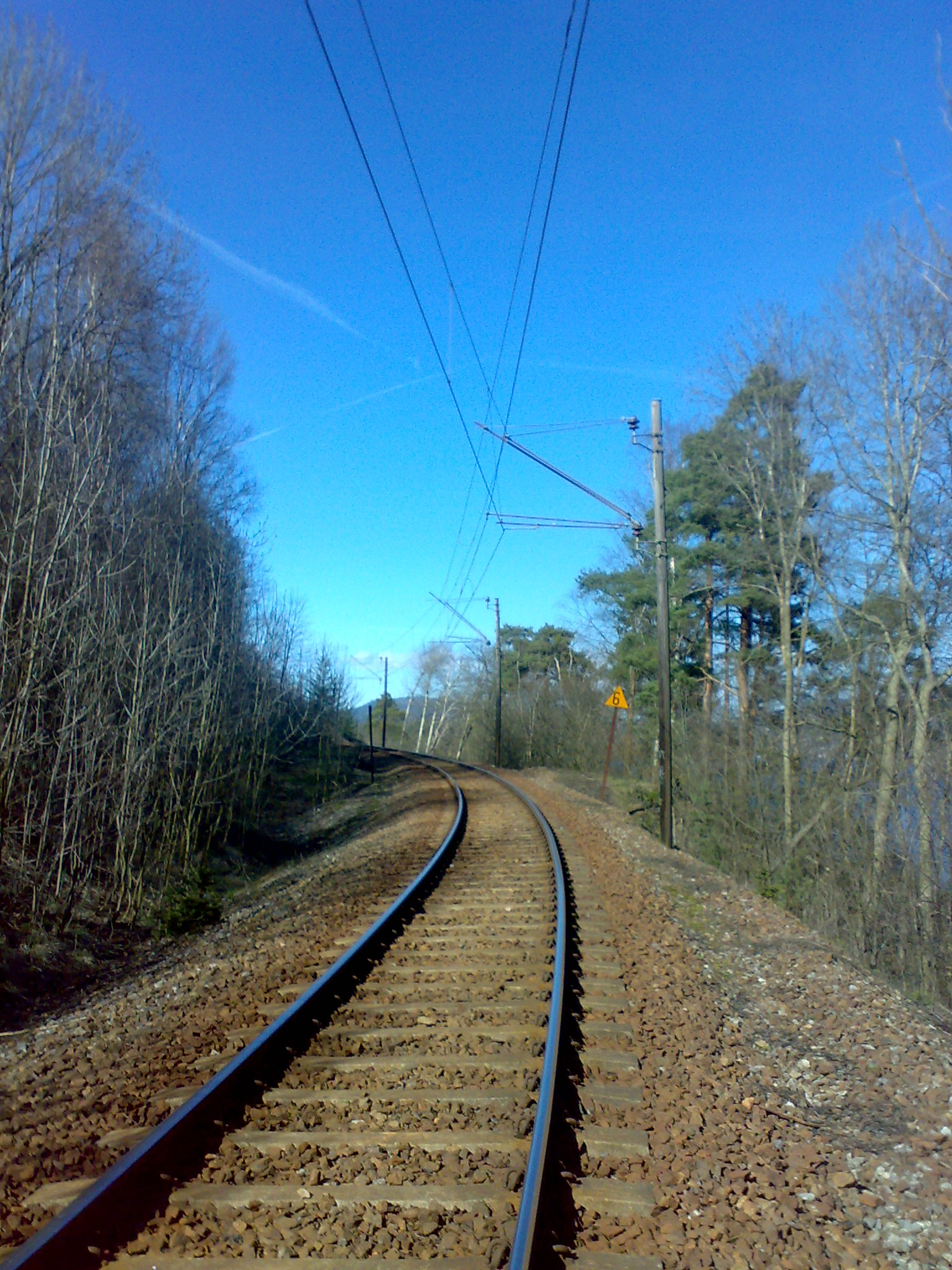 Brevikbanen ved Eidangerfjorden